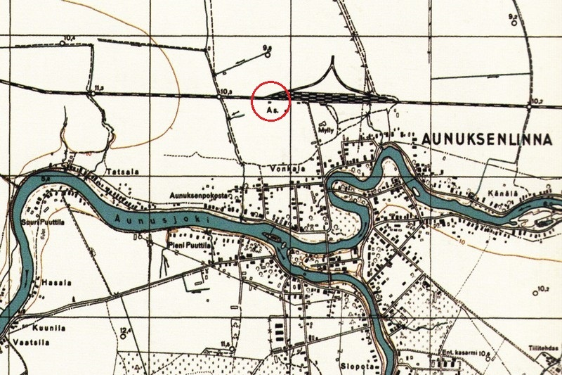 Олонец на карте времён Войны-Продолжения.